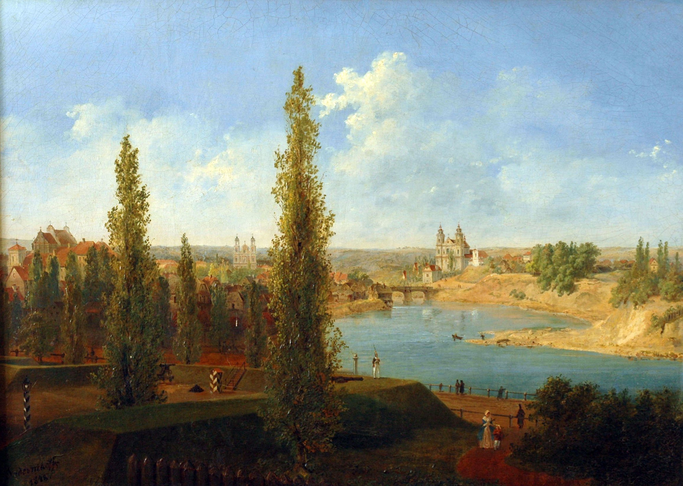 Беларуская (тарашкевіца): Вільня (Vilnia), рака Вяльля (Vialla), Сьніпішкі (Śnipiški). Касьцёл Сьвятога Рафала